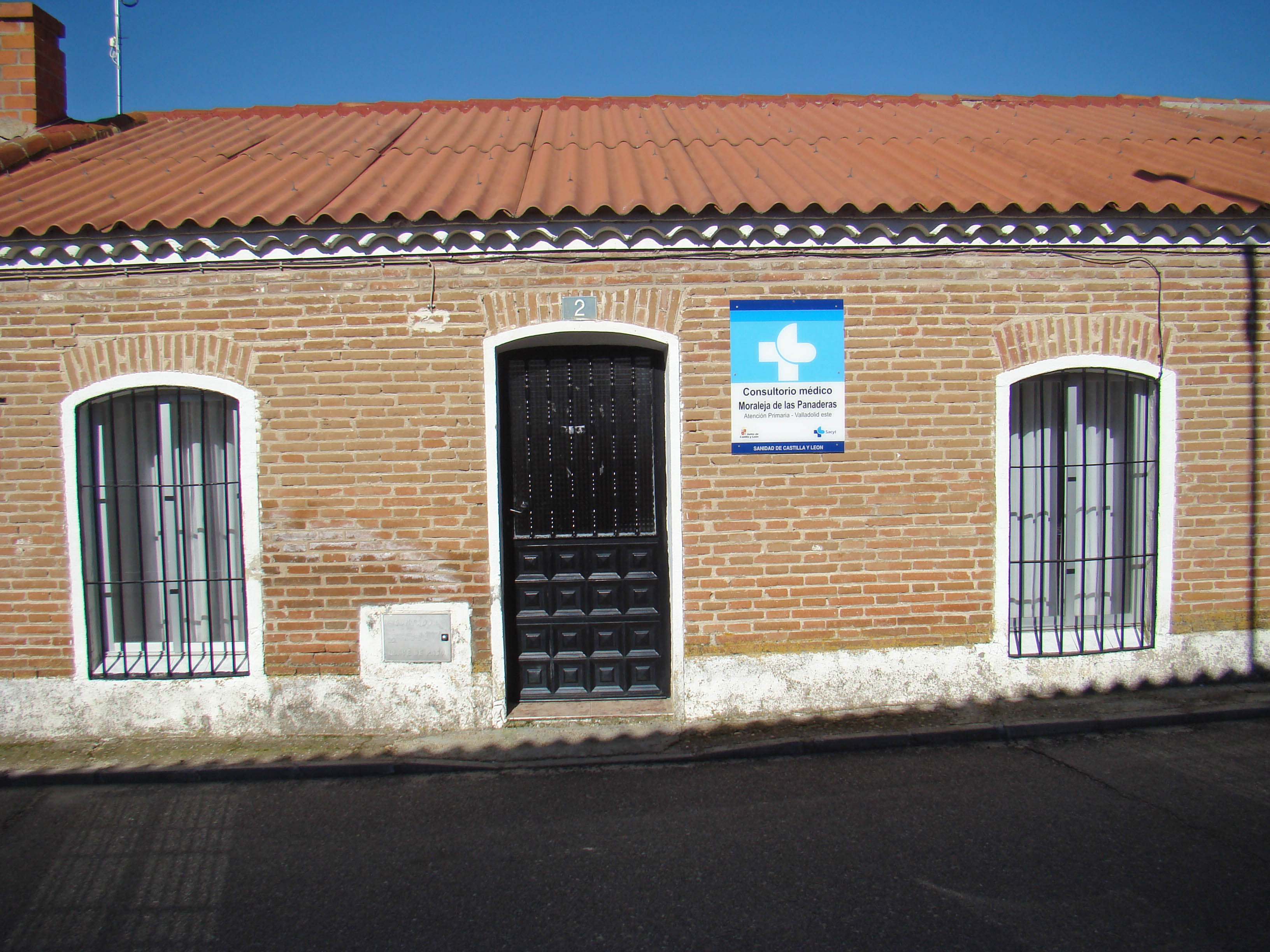 Moraleja de las Panaderas en la provincia de Valladolid, España. Calle de la Iglesia donde se encuentra el Ayuntamiento y el consultorio médico.